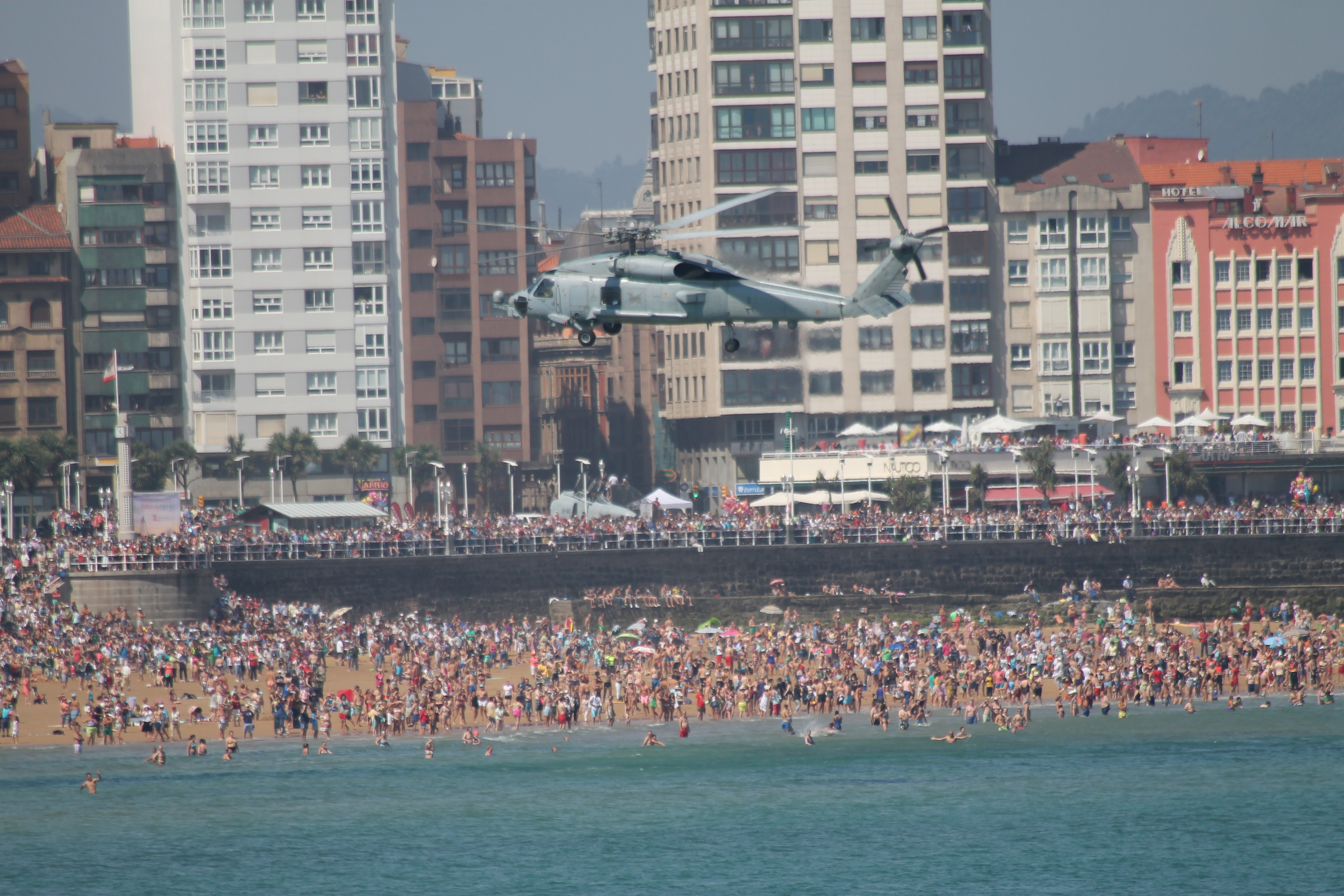 Festival aeronáutico en la playa de San Lorenzo-Gijón-2014